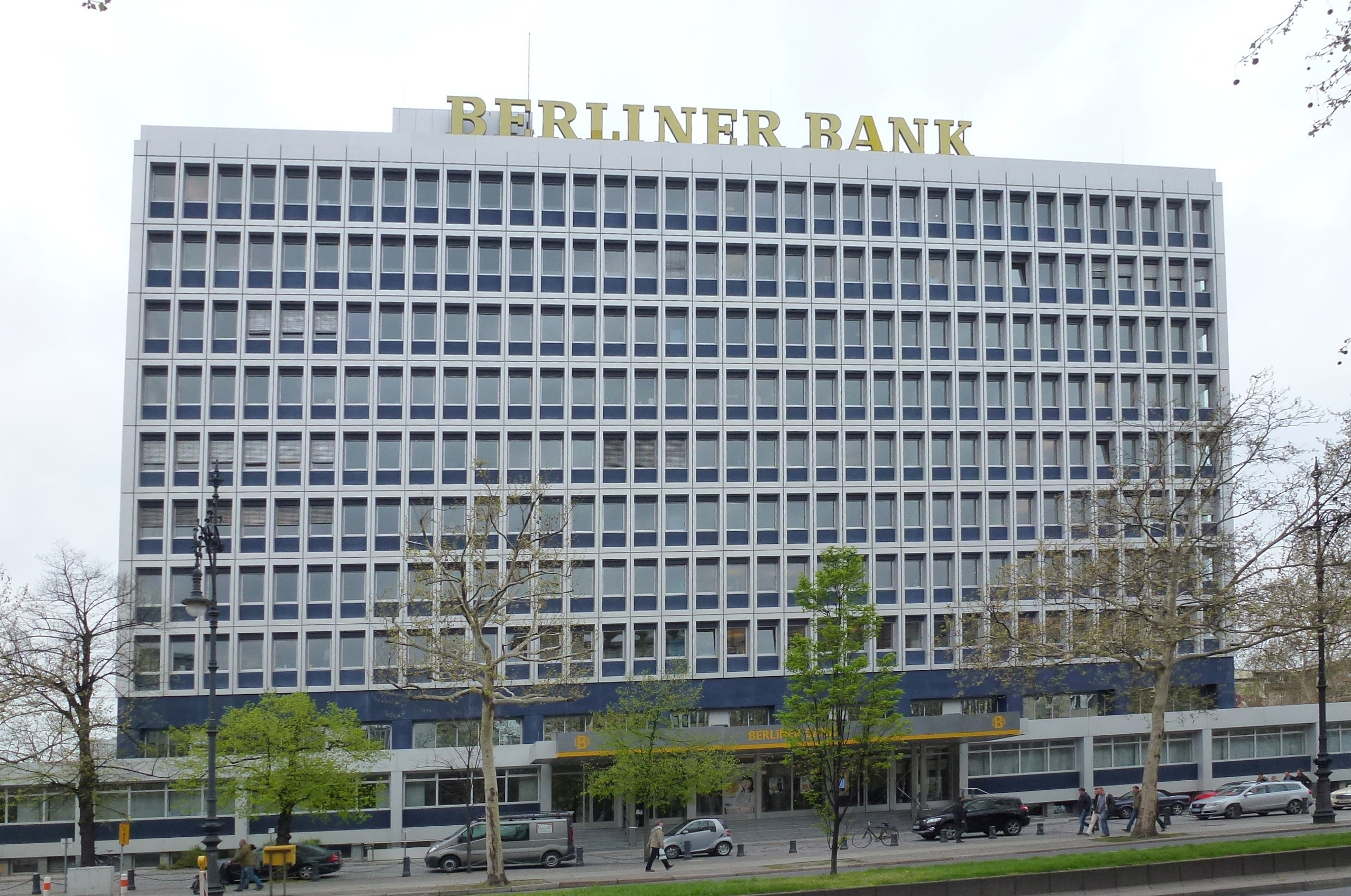 Charlottenburg Hardenbergstraße Berliner Bank April 2014